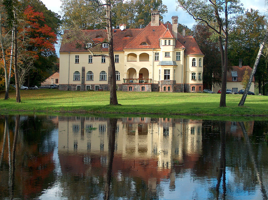 Sławutówko, zespół dworski i folwarczny, XIX, XX